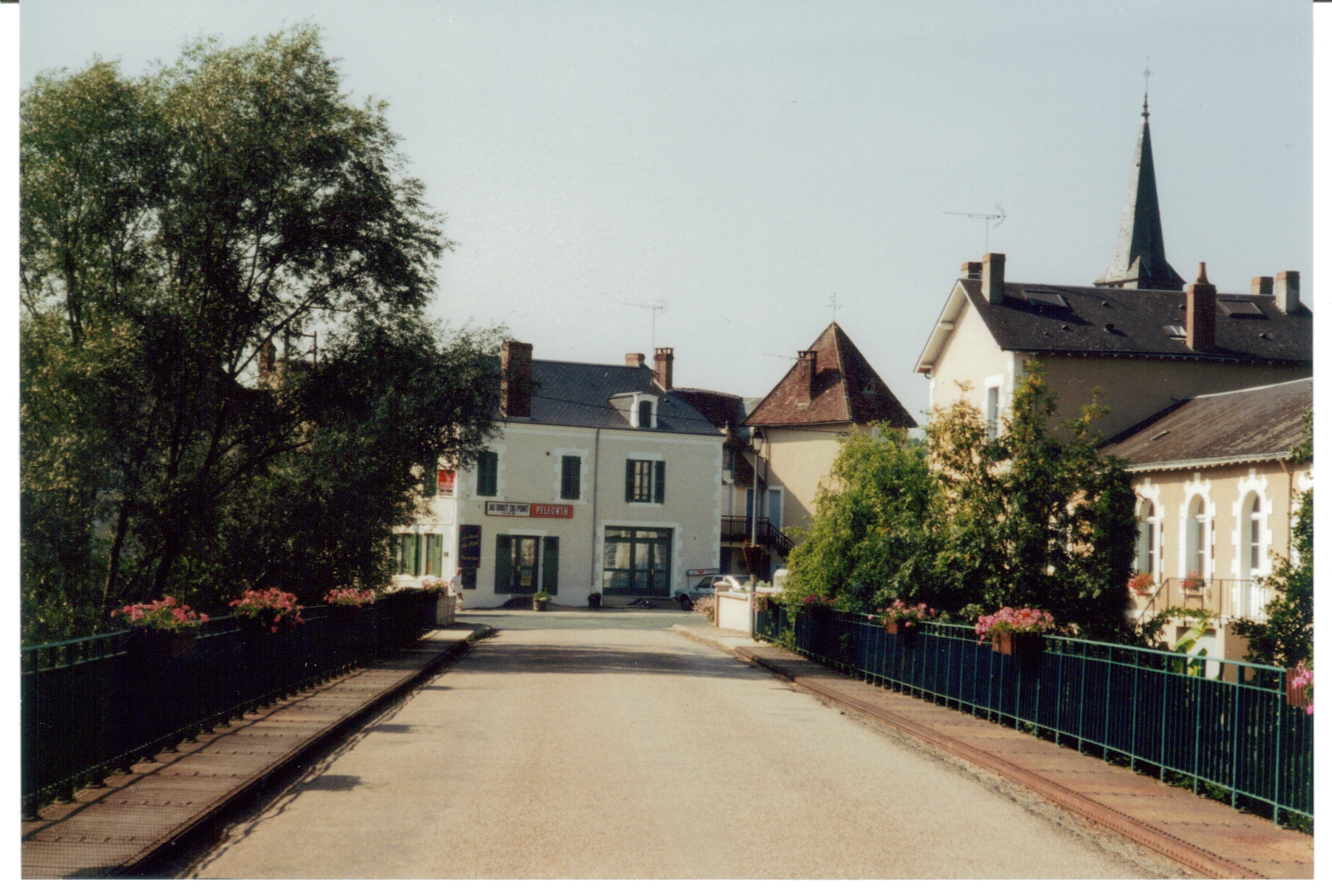 Rivarennes (Indre) Entrée du bourg